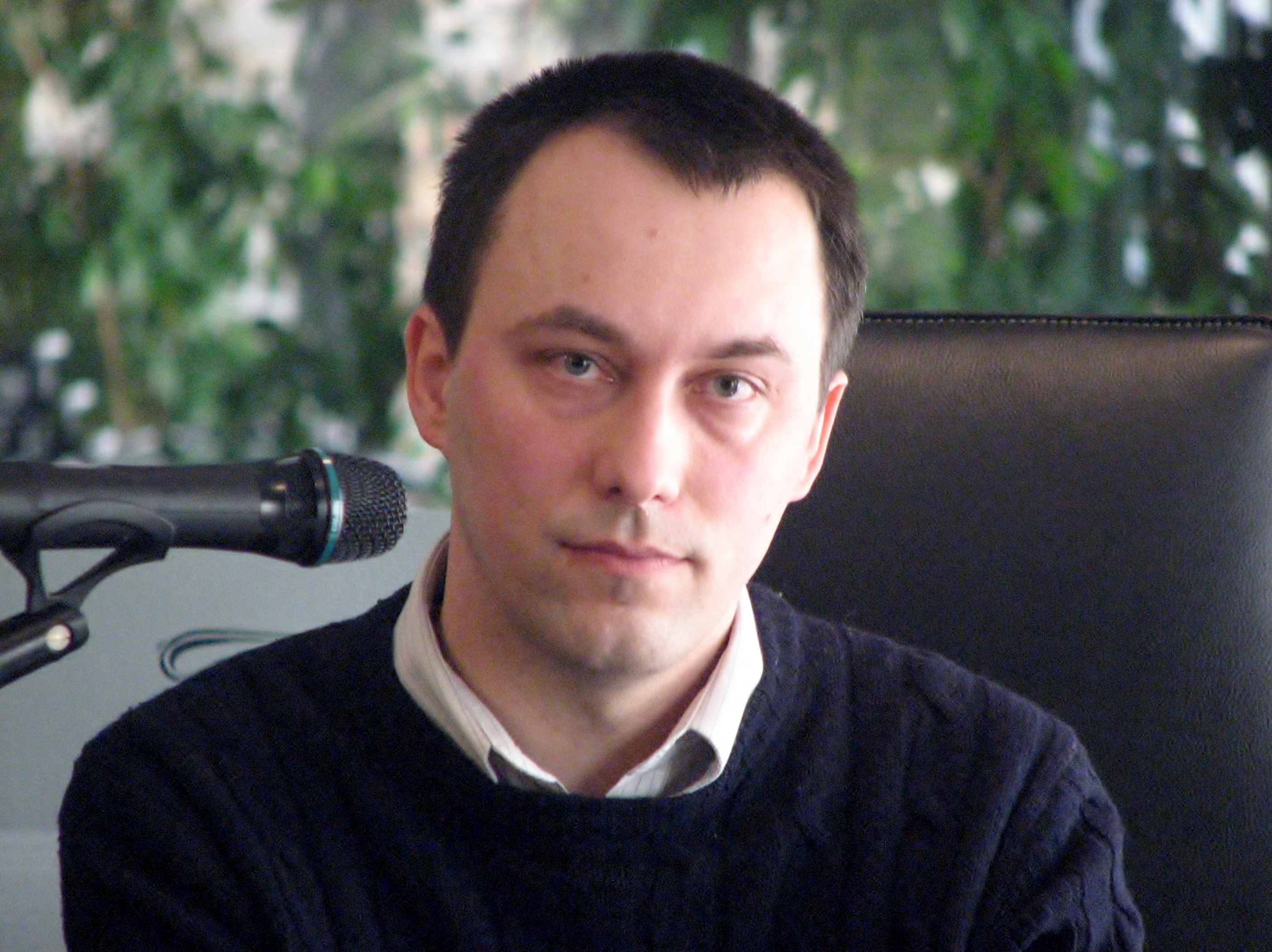 Lauri Suurmaa vestlemas Rauno Võsastega tema raamatu esitlusel Tallinna raamatumessil